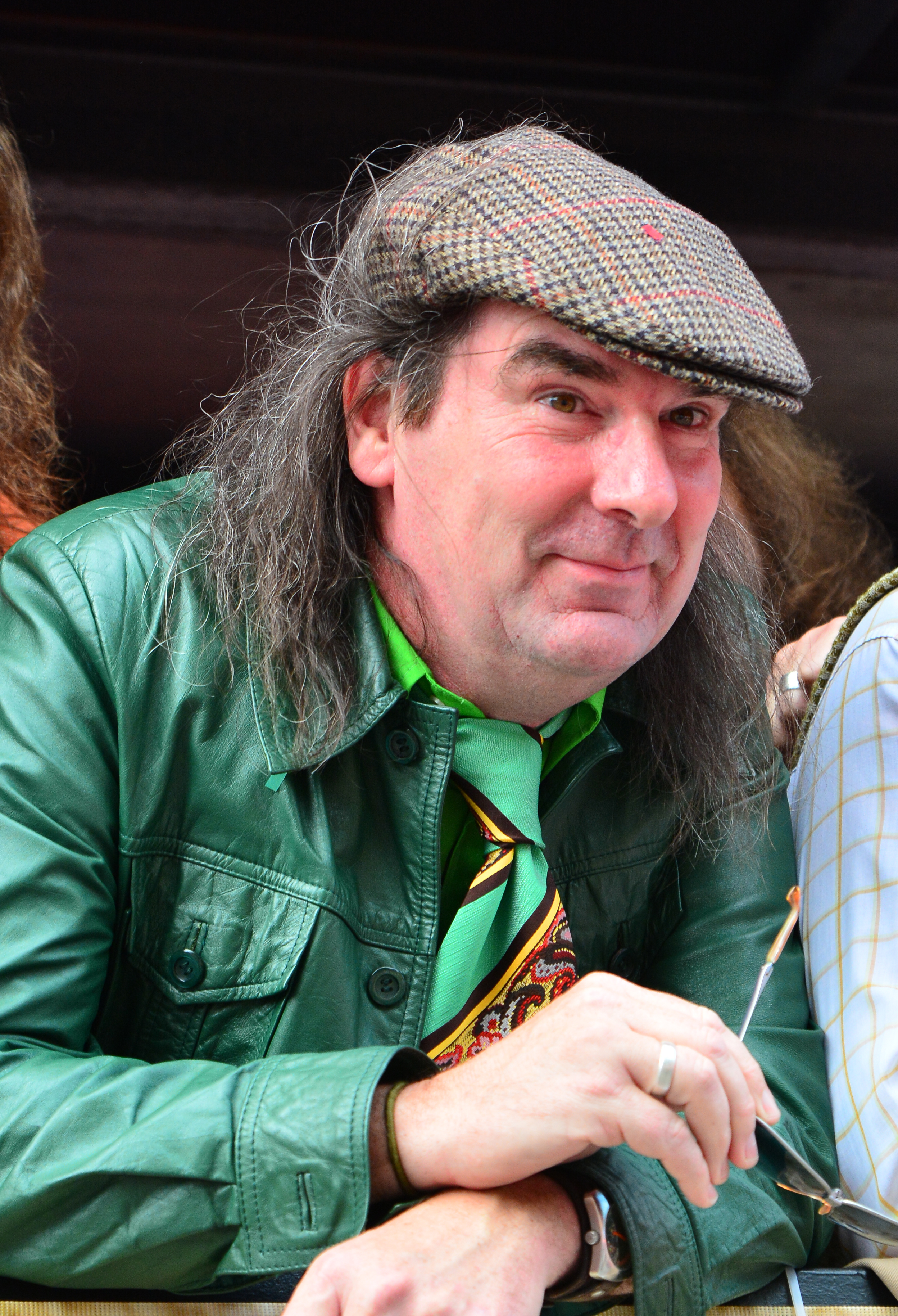 Guildo Horn beim Schlagermove 2015 in Hamburg